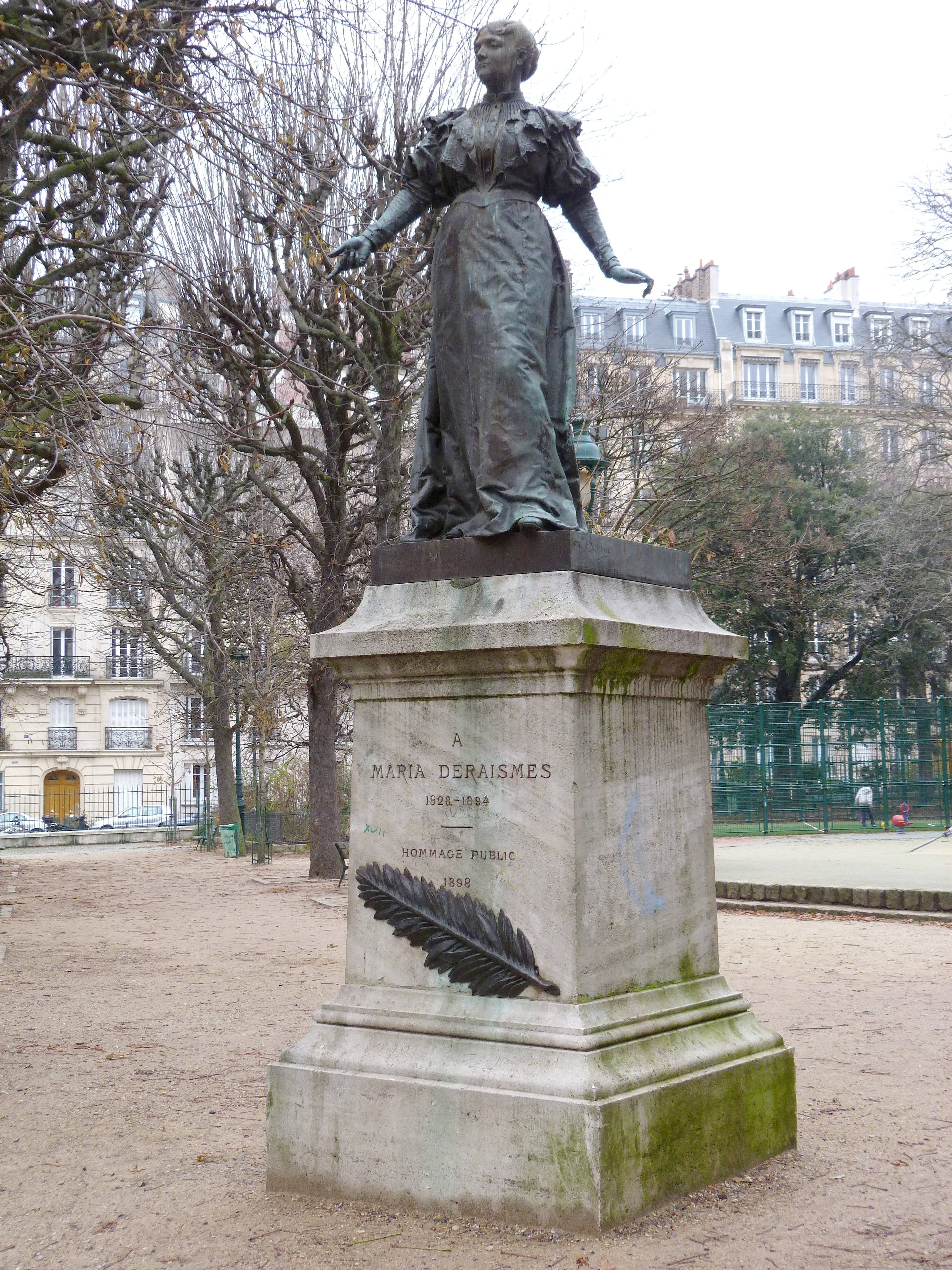 Louis-Ernest Barrias, bronze, statue de Maria Deraismes (1828-1894), square des Épinettes, Paris (17e arrond.) - La statue originale fut installée en 1898, fondue en en 1942 par l'occupant allemand, reproduite et ré-installée en 1983.